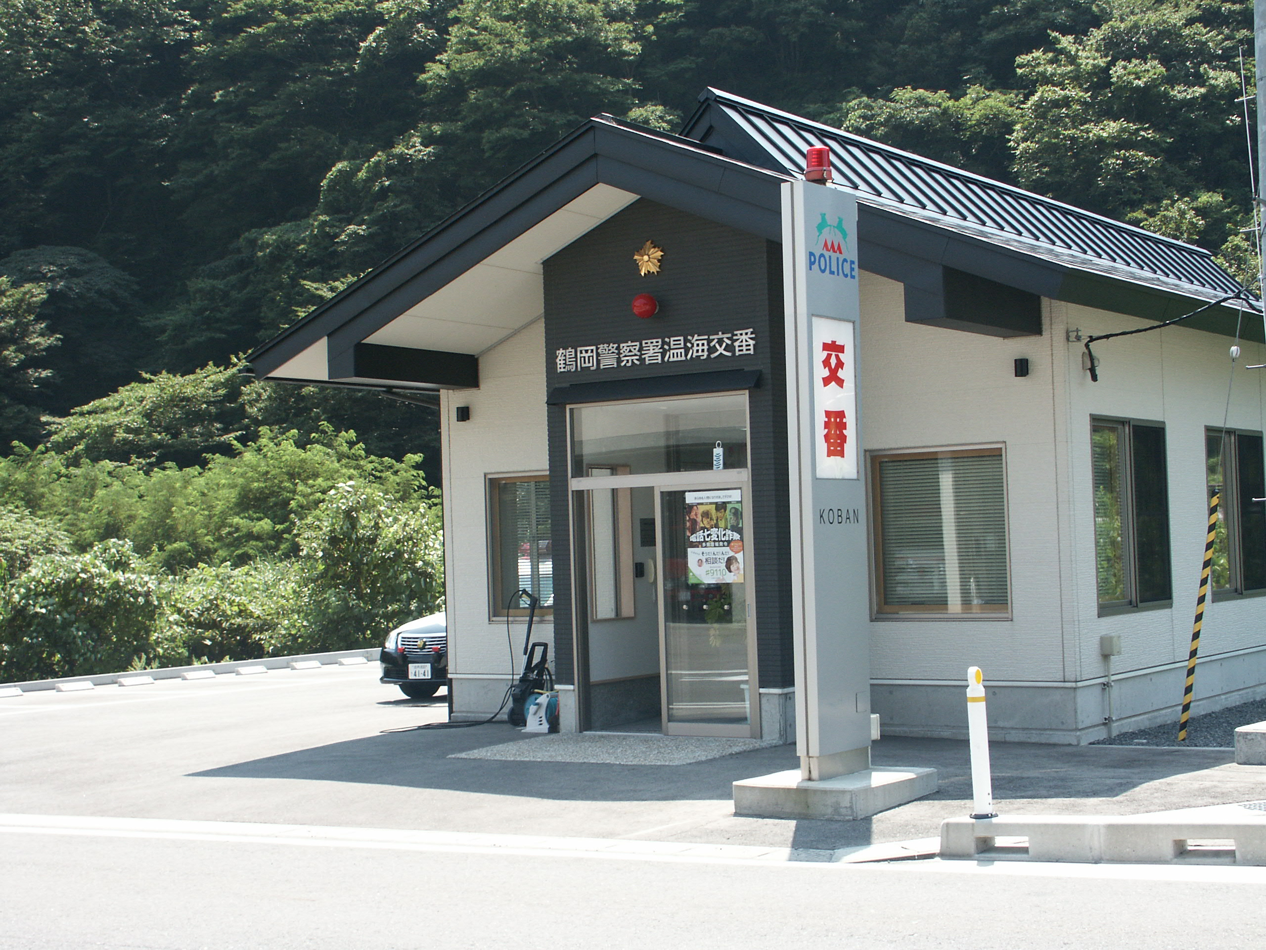 鶴岡警察署温海交番